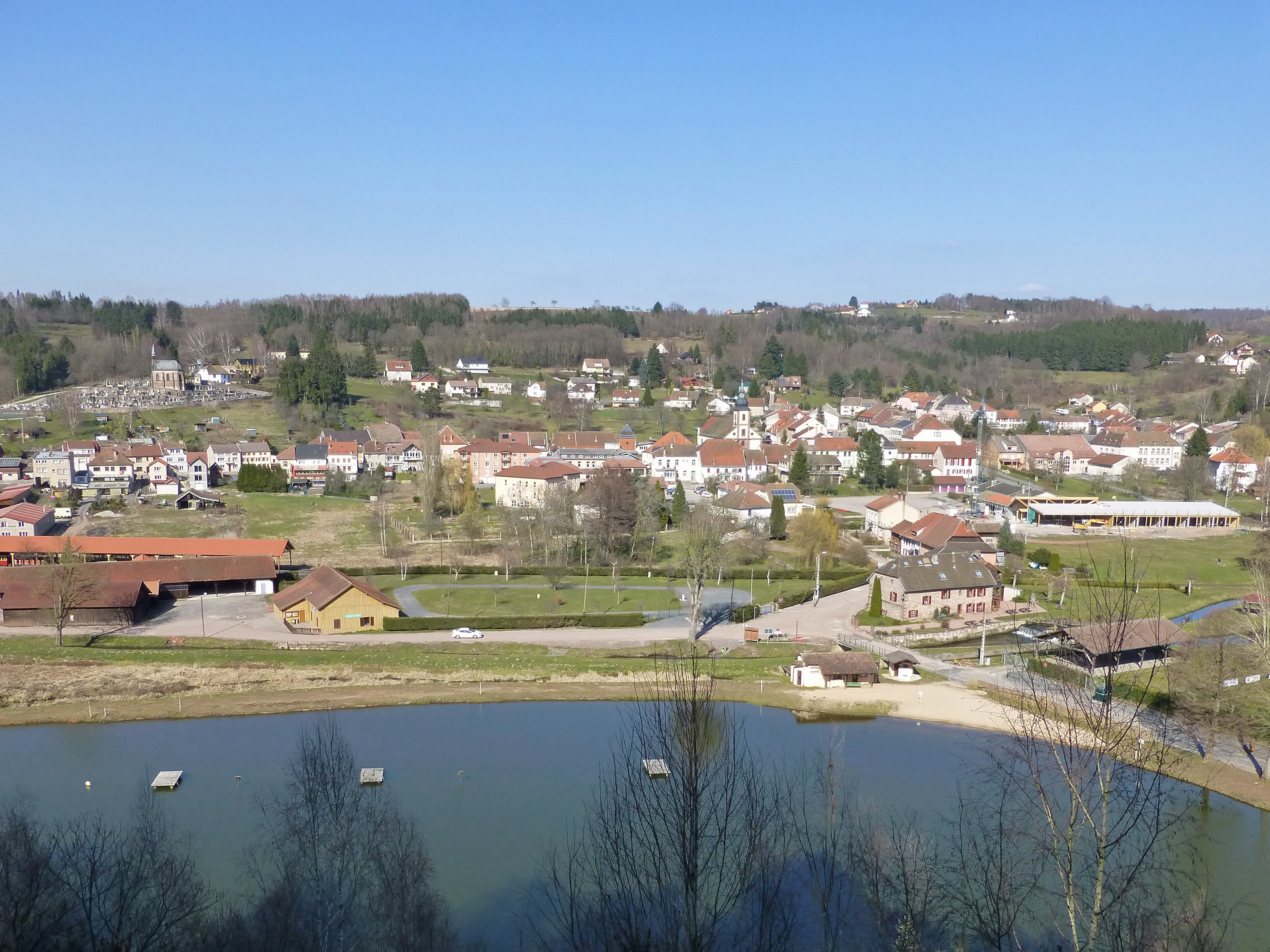 Vue sur Abreschviller (Moselle) depuis la roche du Moulin (296 m)